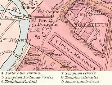 kartographische Darstellung des römischen Forum Boarium